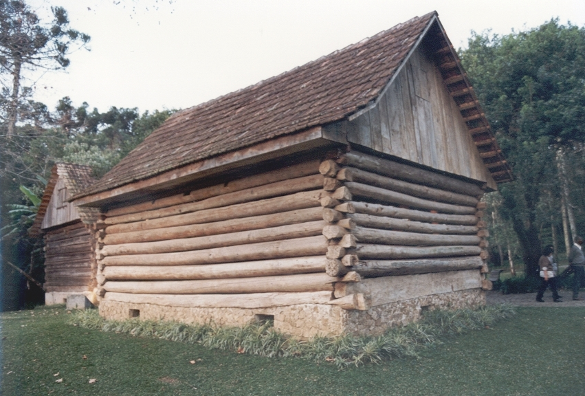 Curitiba - Bosque do Papa - Galpão de imigrantes poloneses.